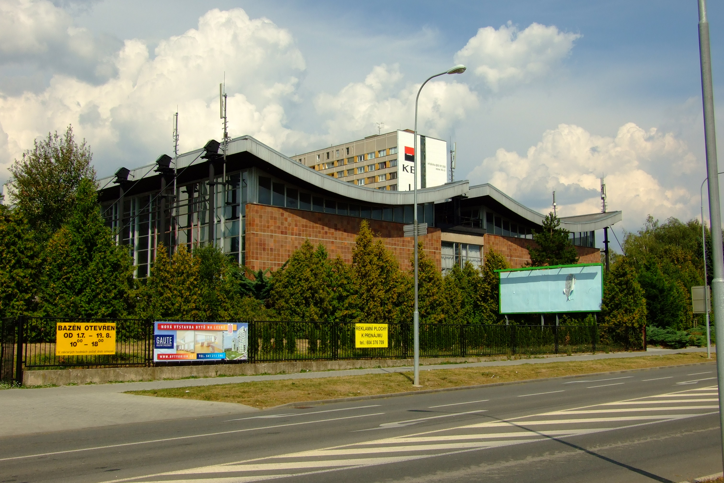 Brno-Lesná - krytý plavecký bazén u Okružní ulice, Halasovo náměstí 826/7.